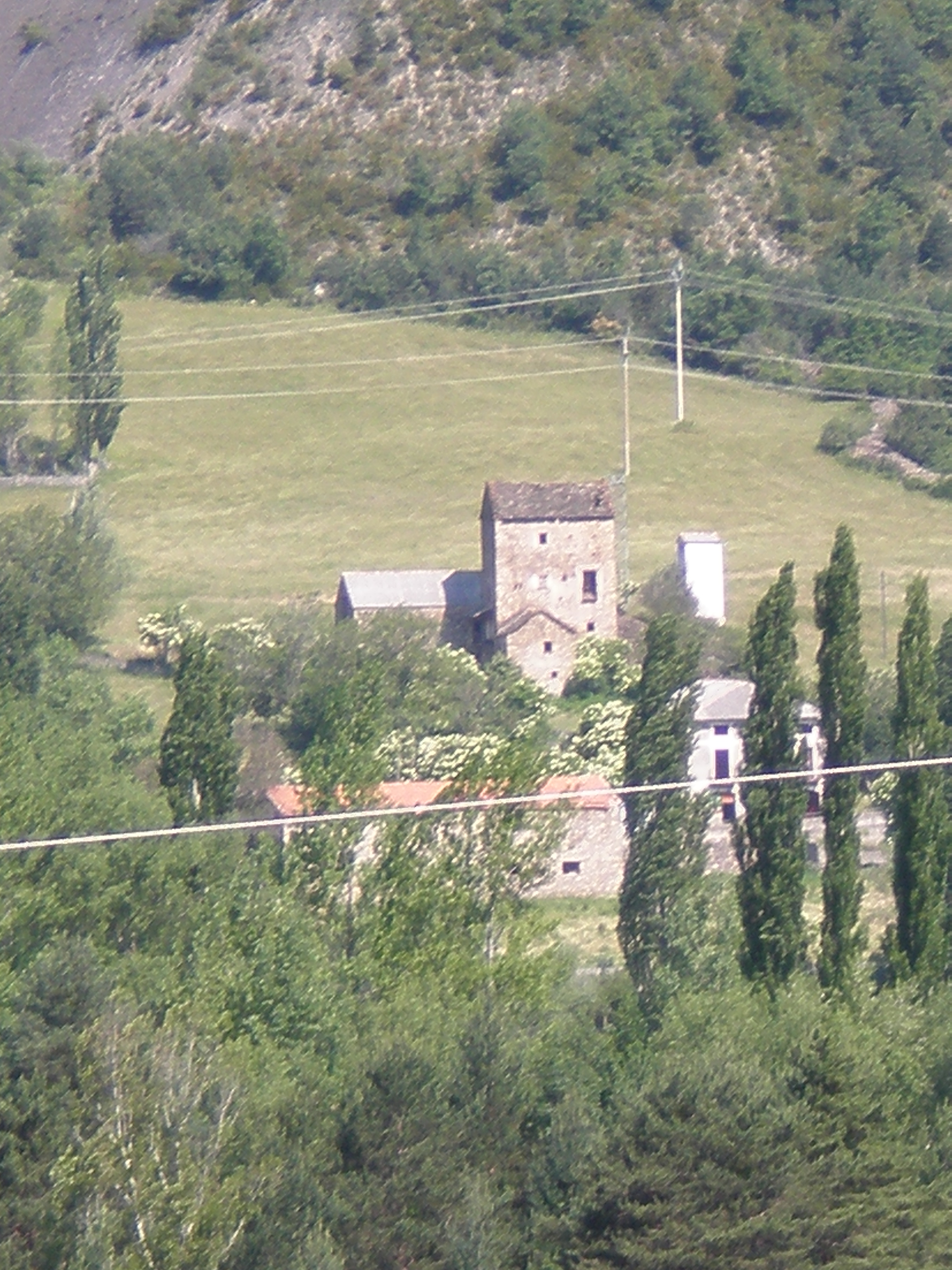 Antiguo pueblo de Aruej